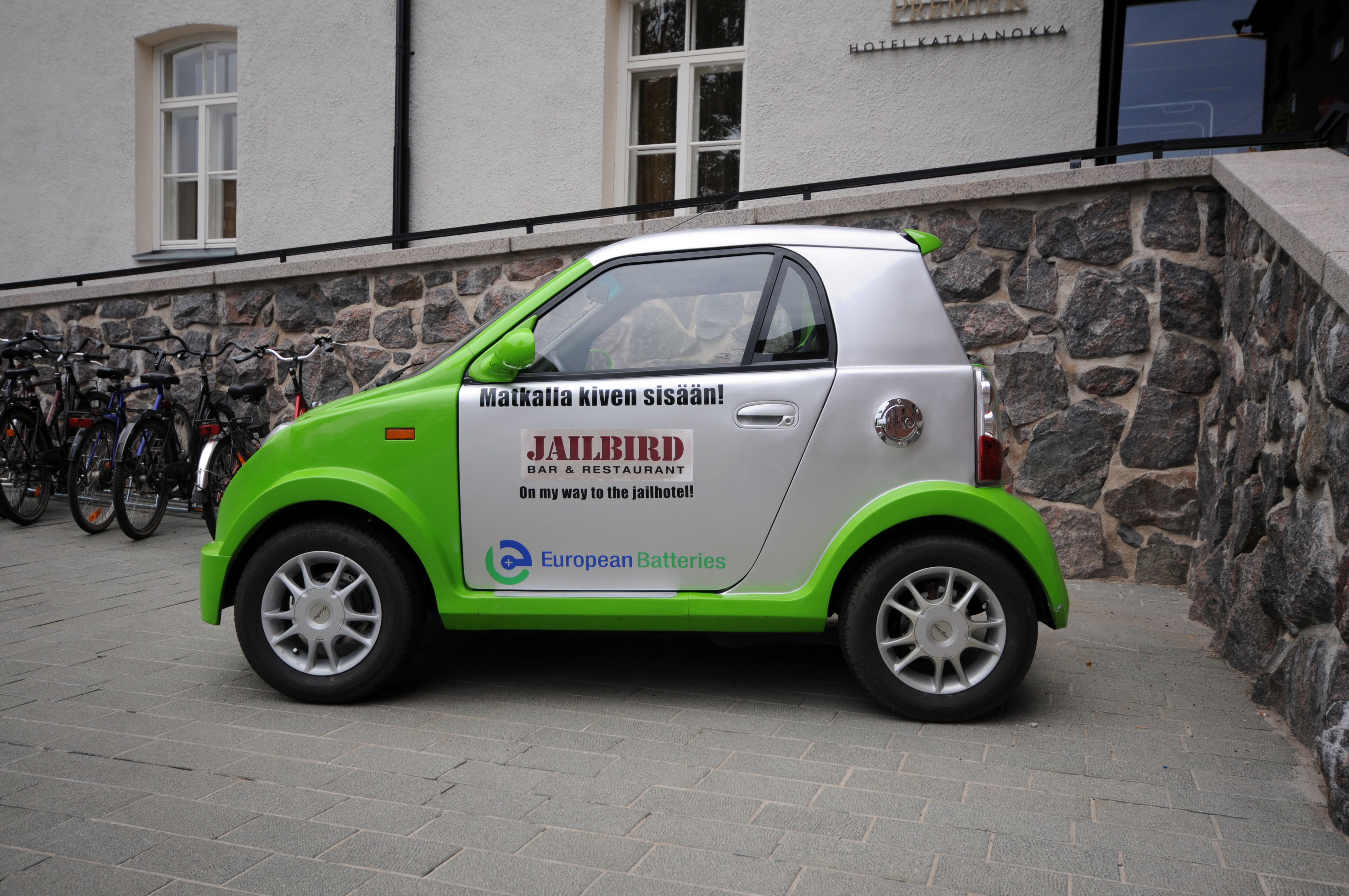 Helsinki